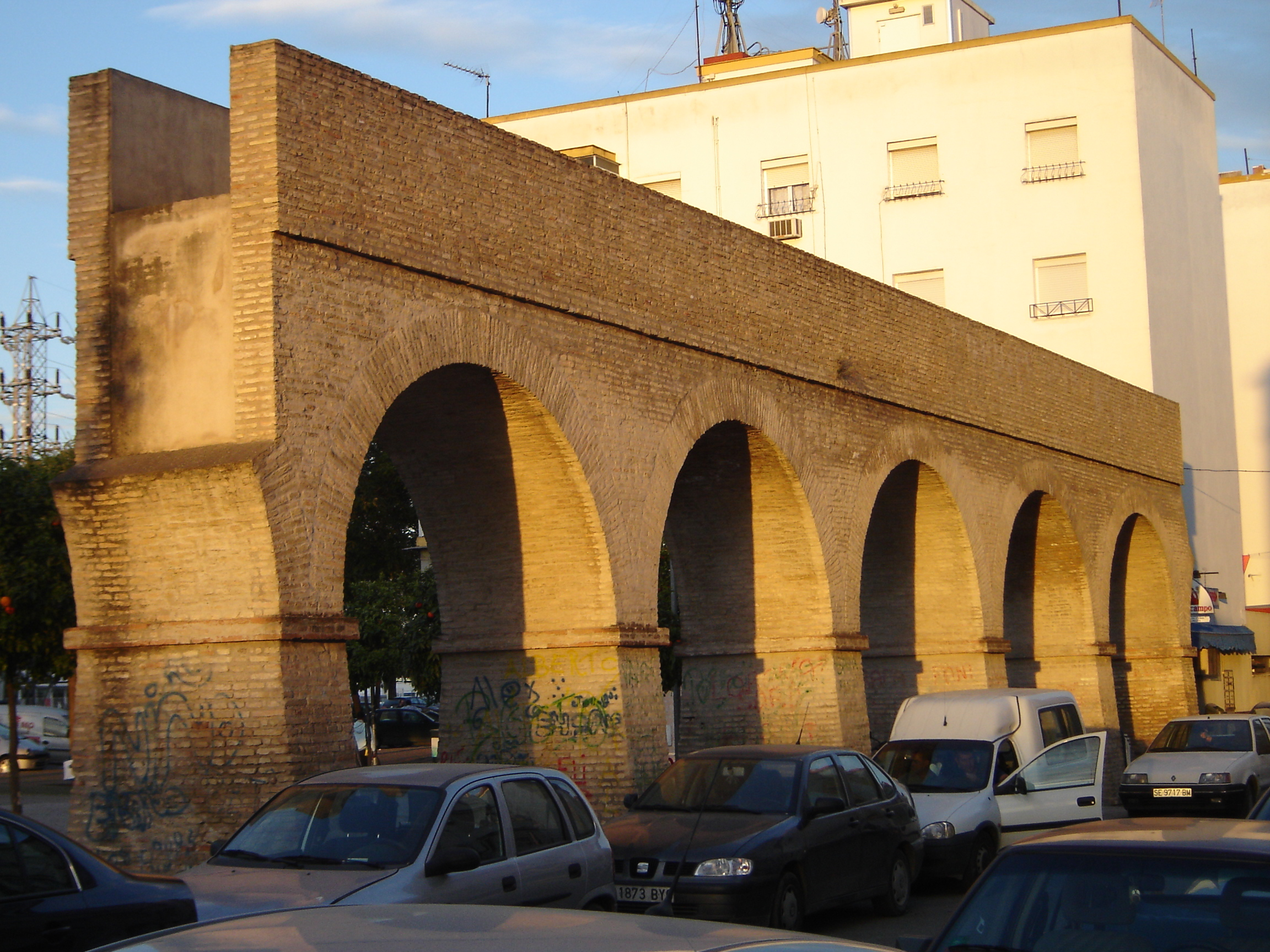 Restos del acueducto romano (la primera arcada) conocido como "Caños de Carmona" de Sevilla